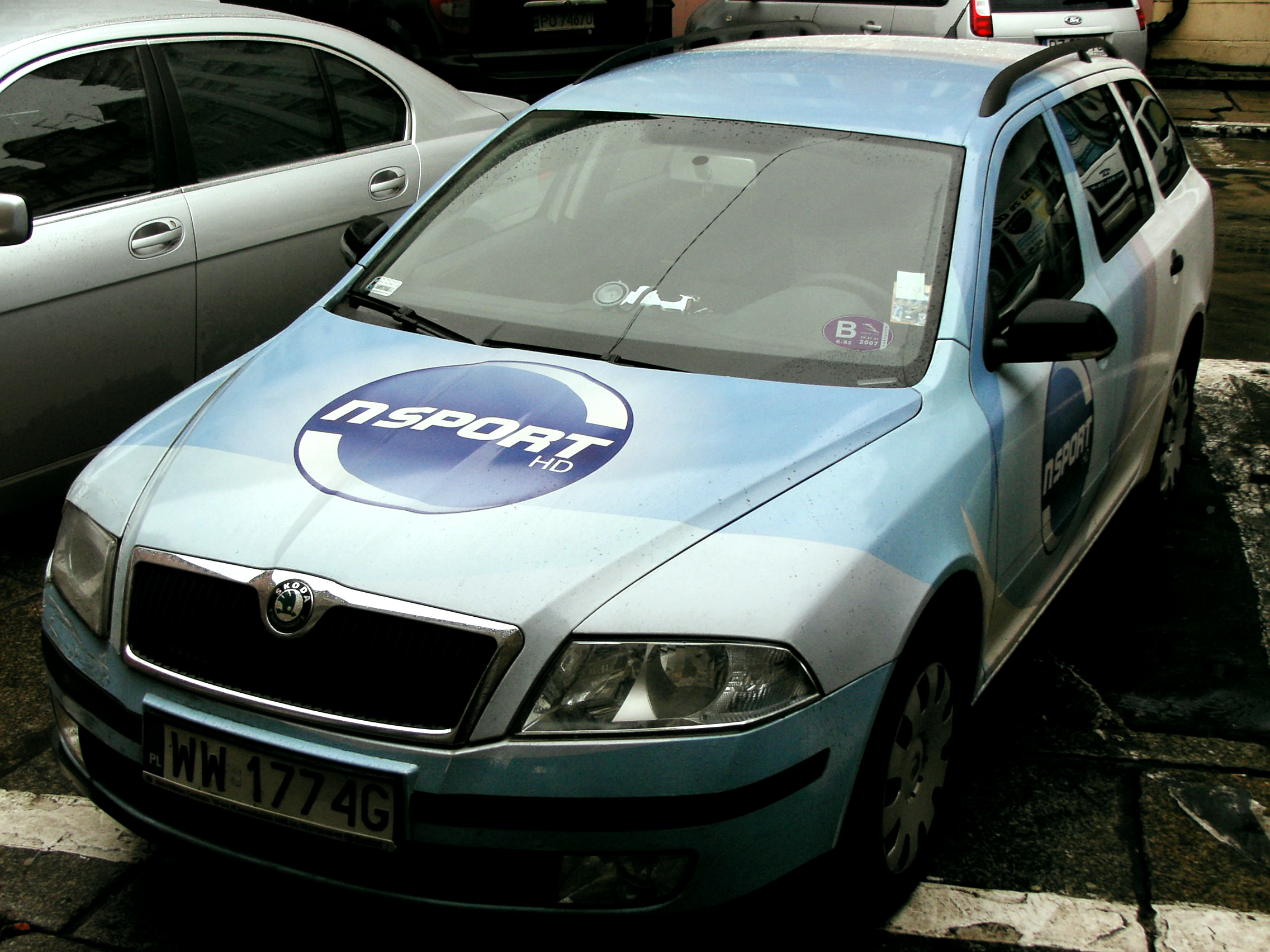 wóz reporterski kanału nSport. Grupa ITI TVN.